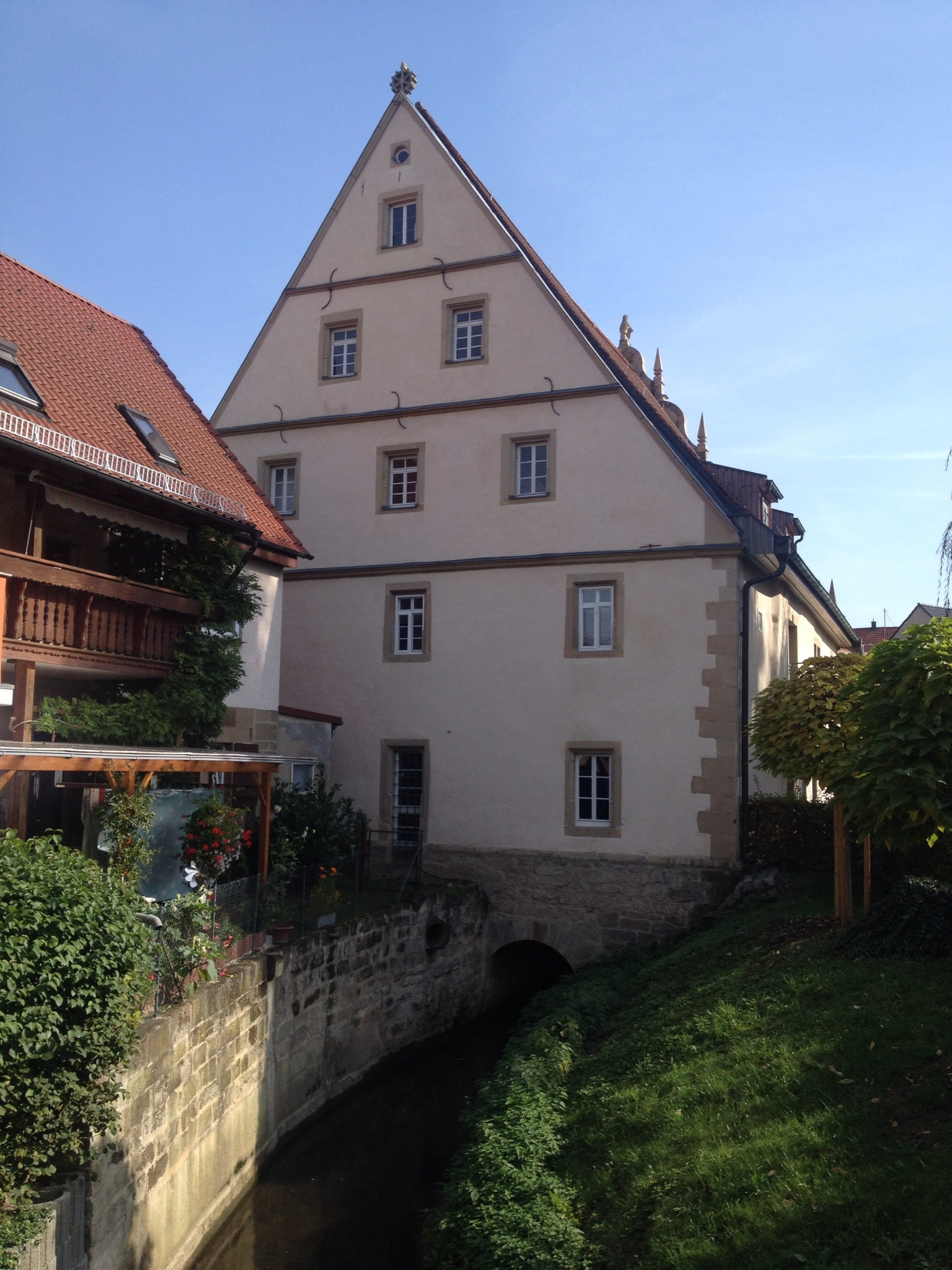 Brettacher Mühle